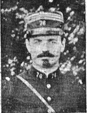 photo de clément loubet